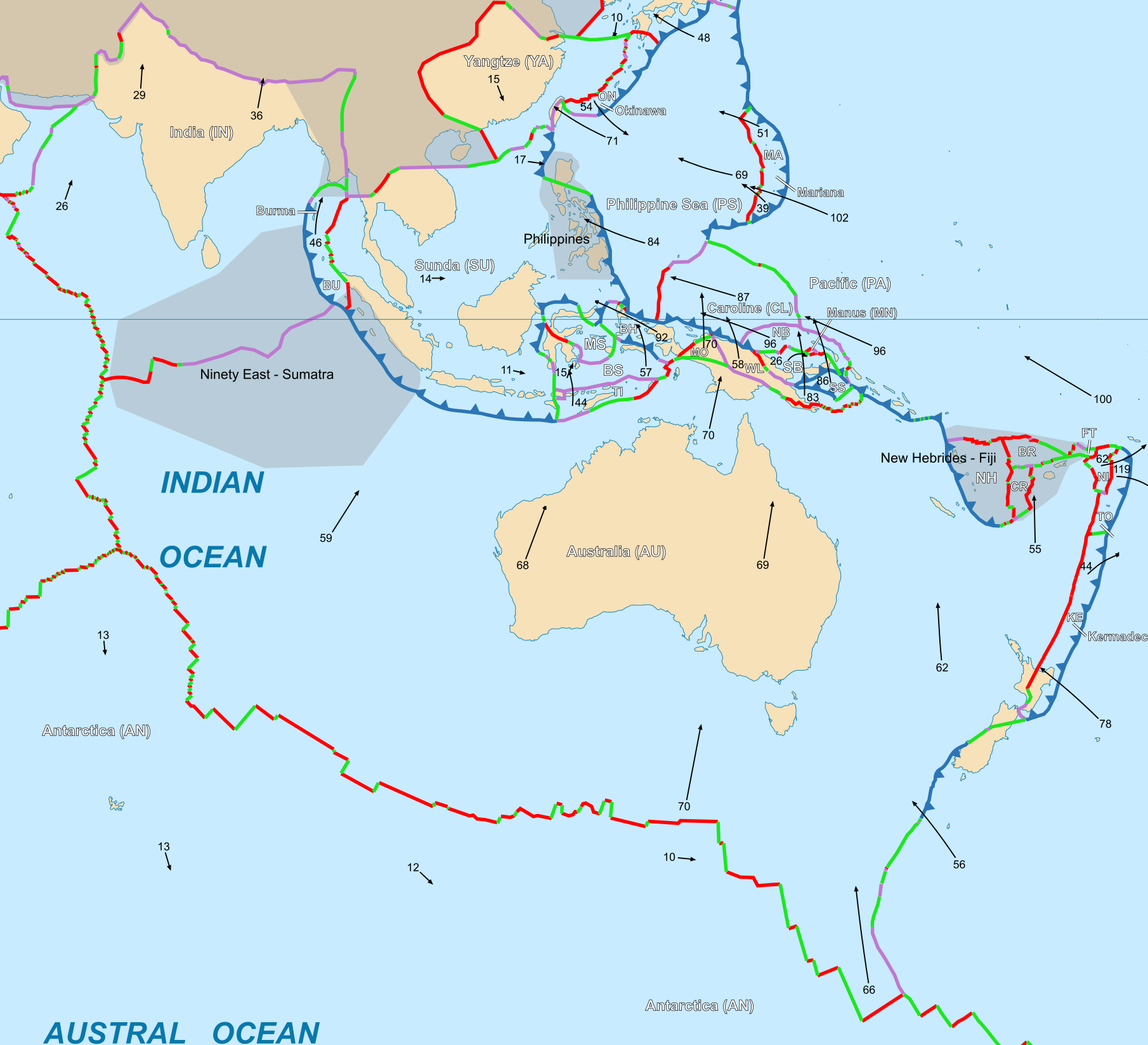 Austral indian plate